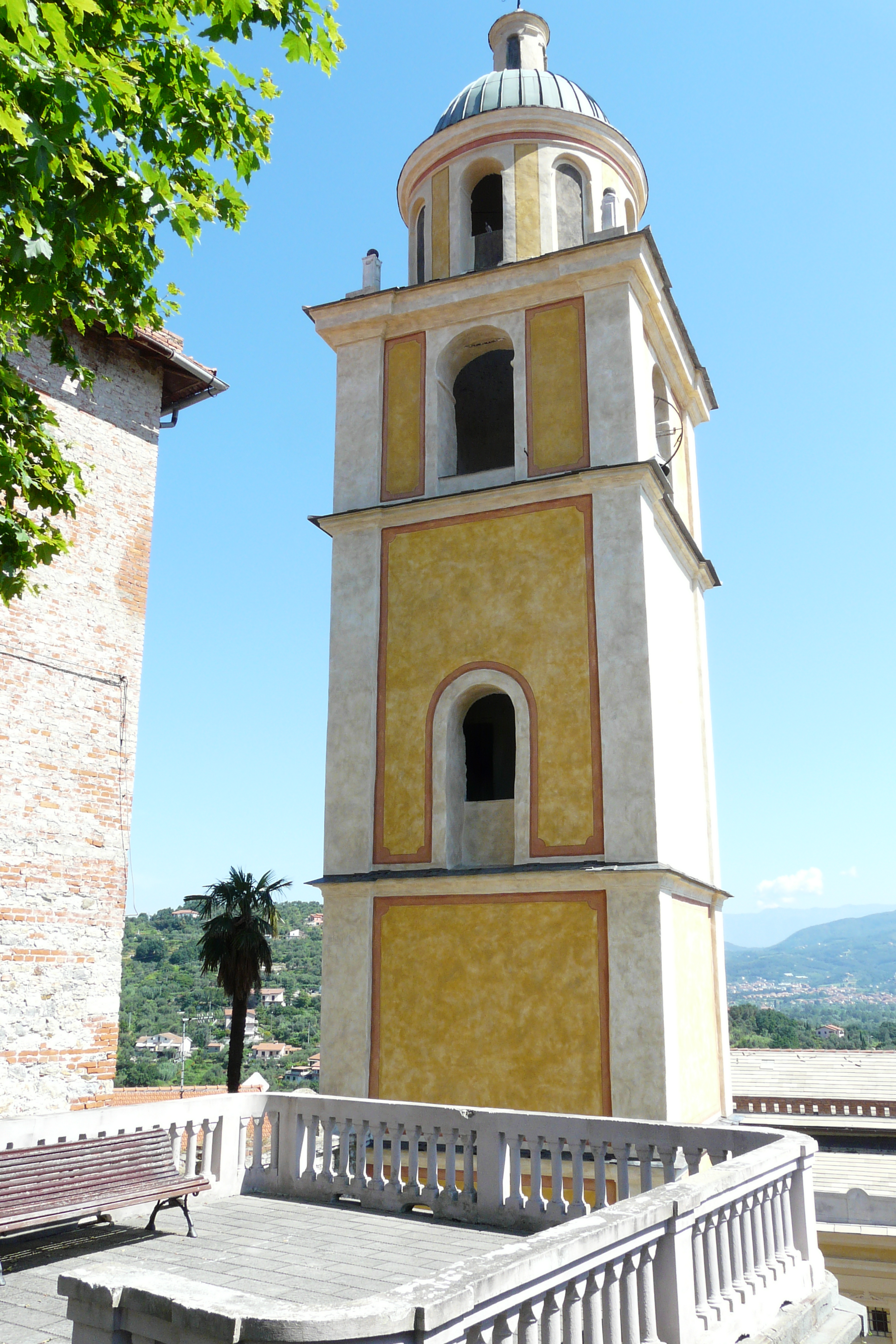 Chiesa di San Nicolò di Arcola, Liguria, Italia